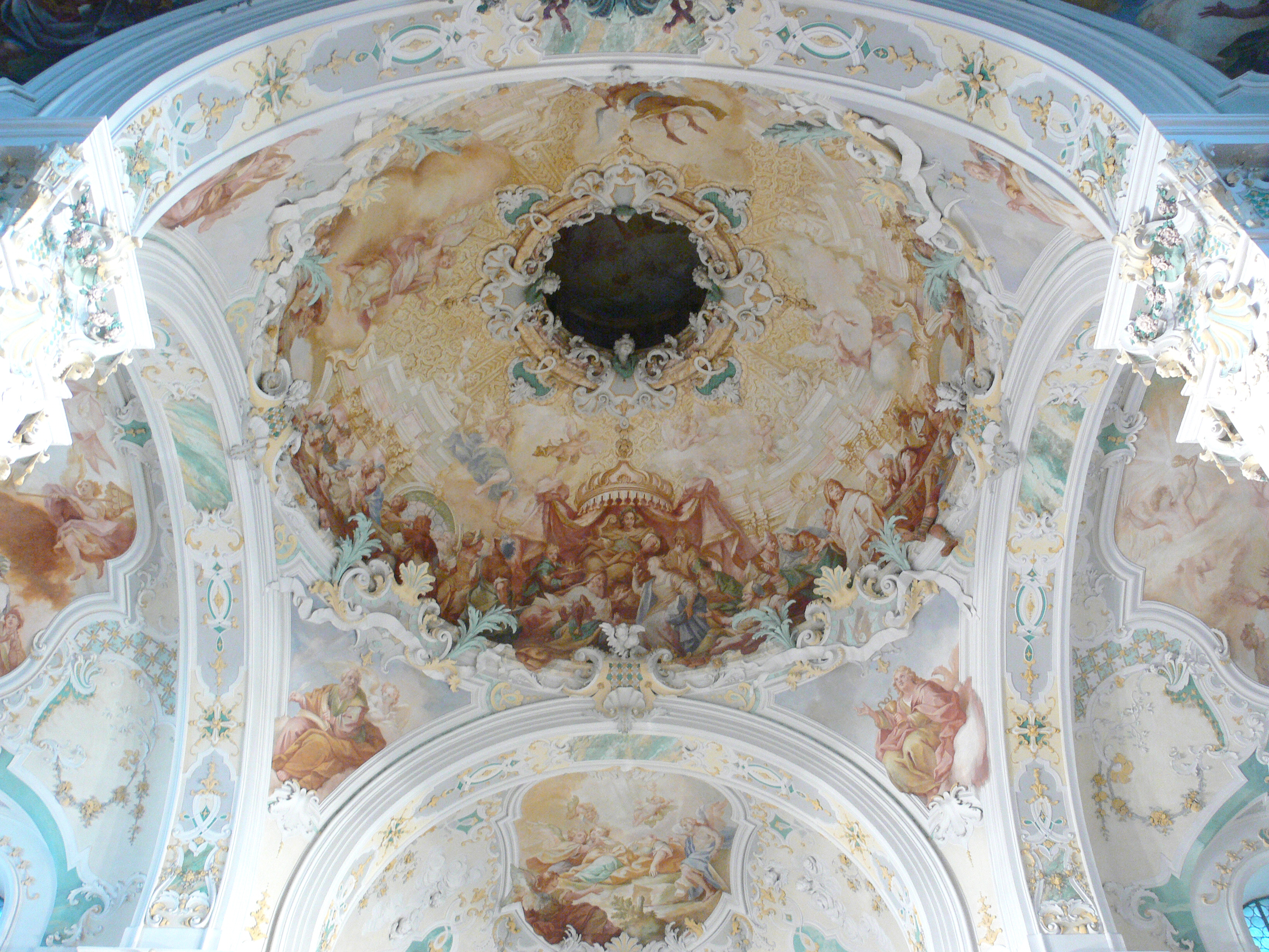 Pfarrkirche St. Katharina (Wolfegg): Chorkuppel Gemälde: Martyrium der Hl. Katharina (Katharina vor dem römischen Kaiser Maximinus Daja), vermutlich entworfen von Franz Joseph Spiegler, vermutlich ausgeführt von dessen Schüler Franz Anton Erler um 1735